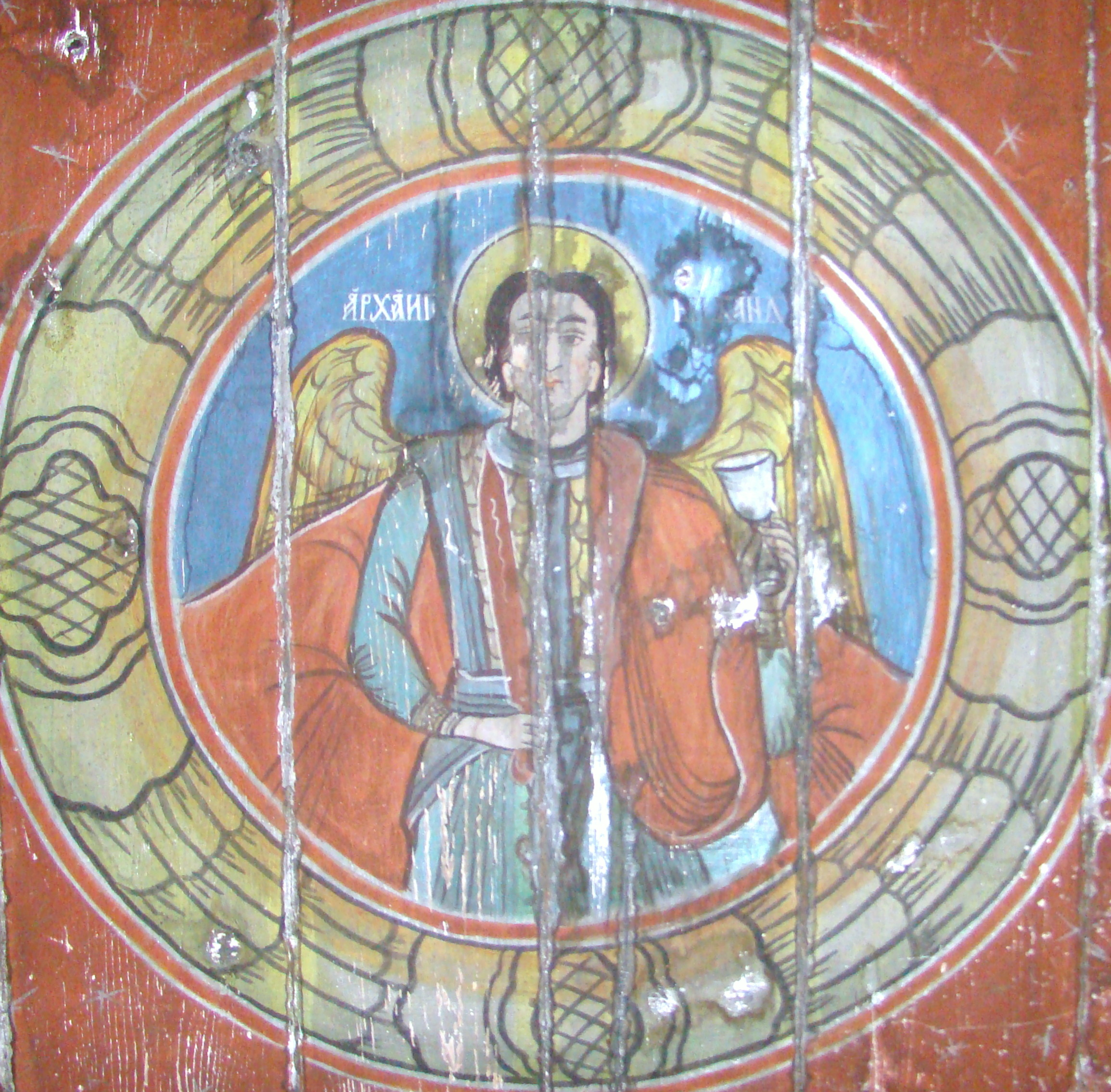 Biserica de lemn din Copand